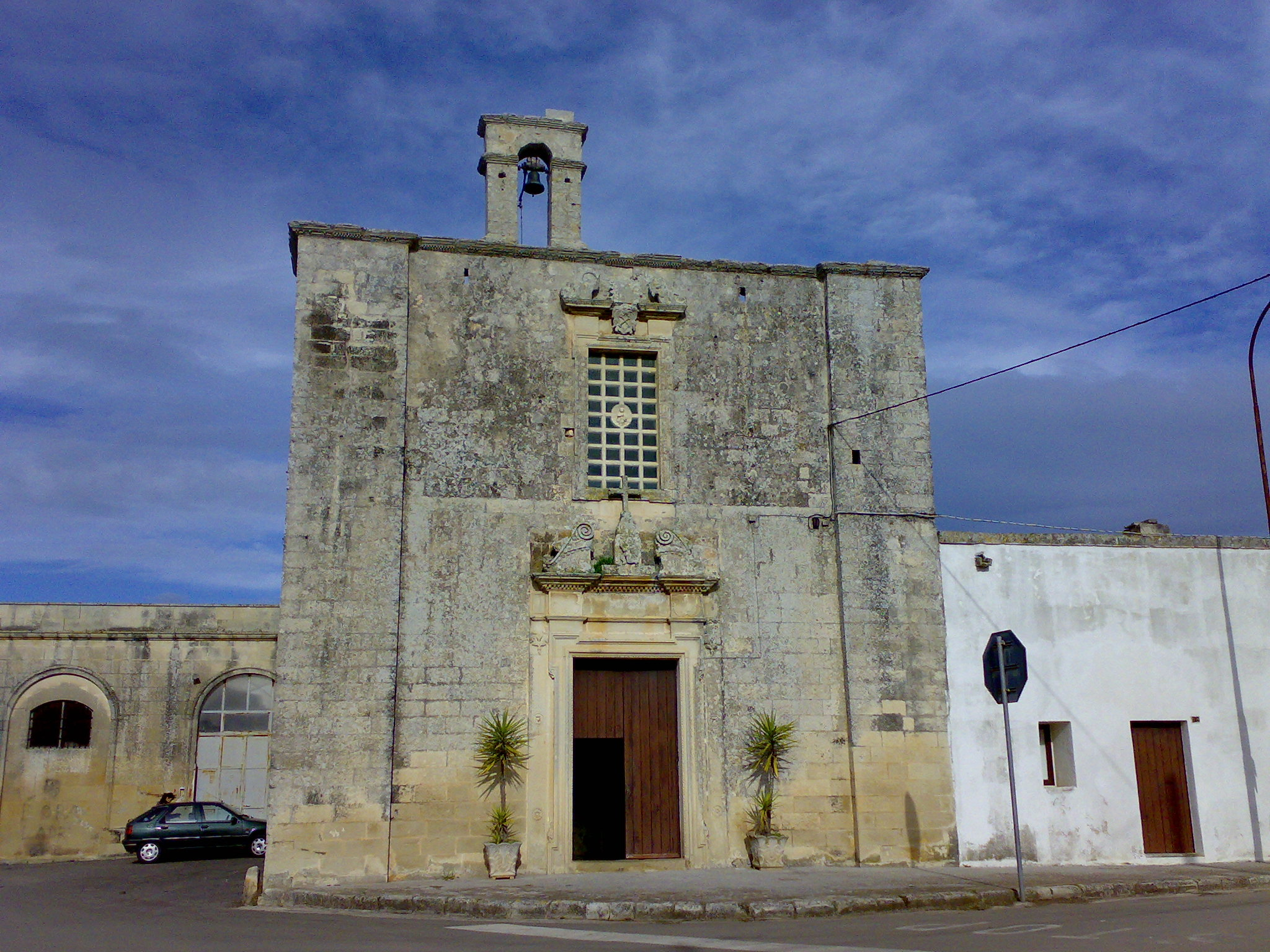 Minervino_di_Lecce_Chiesa delle Grazie, provincia di Lecce